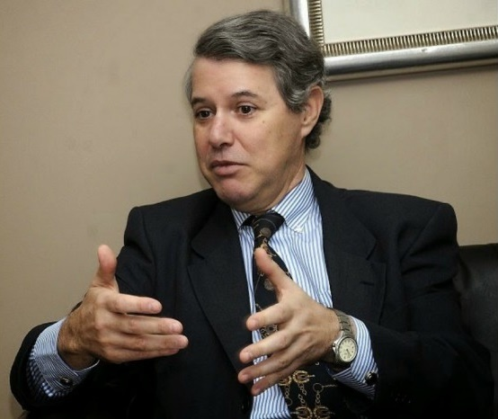 Cristóbal Colón de Carvajal y Gorosábel, XVIII duque de Veragua y grande de España, XVII marqués de Jamaica, XIX marqués de Aguilafuente, XX almirante de la Mar Océana y adelantado de las Indias.